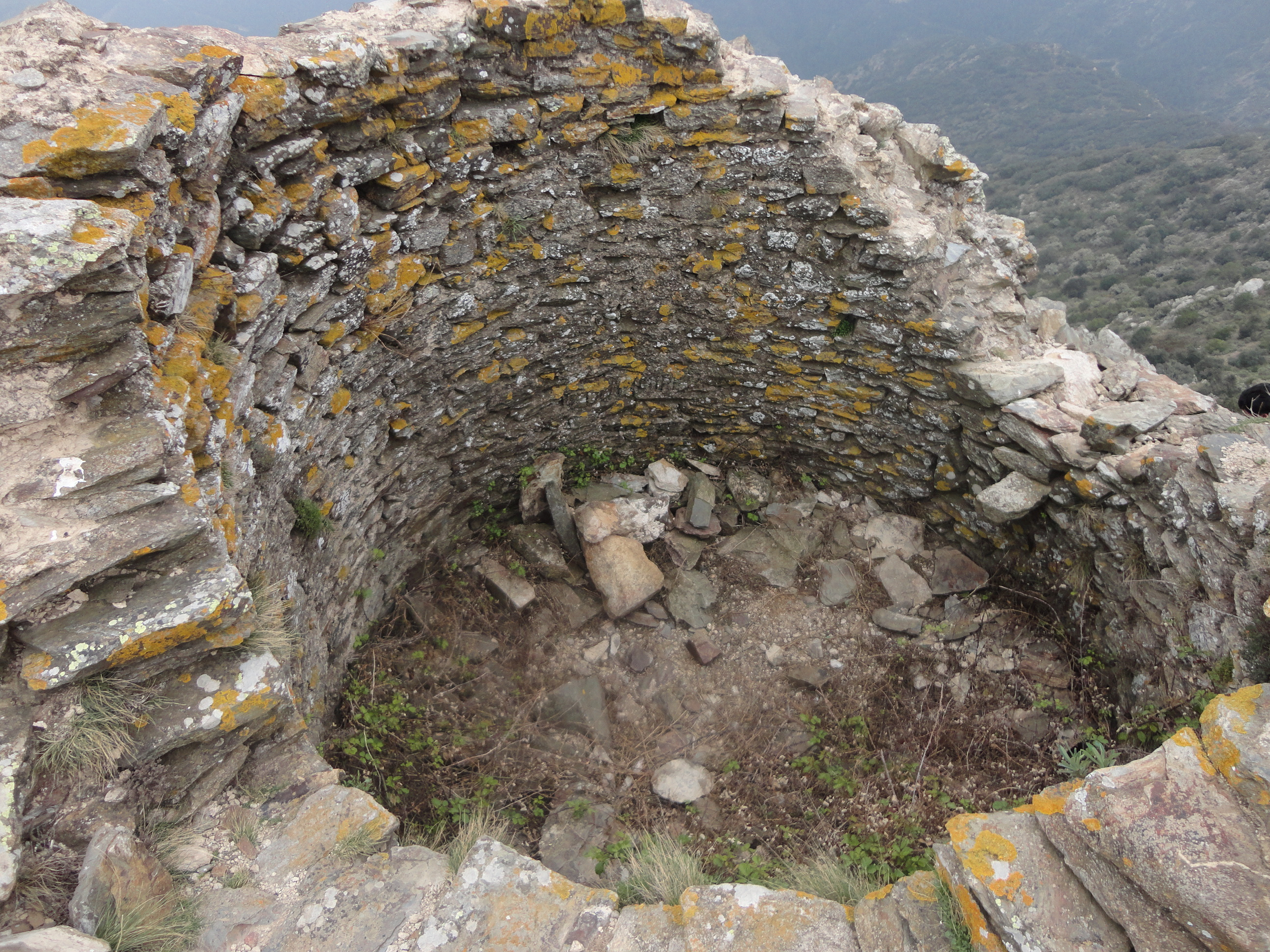 Torre